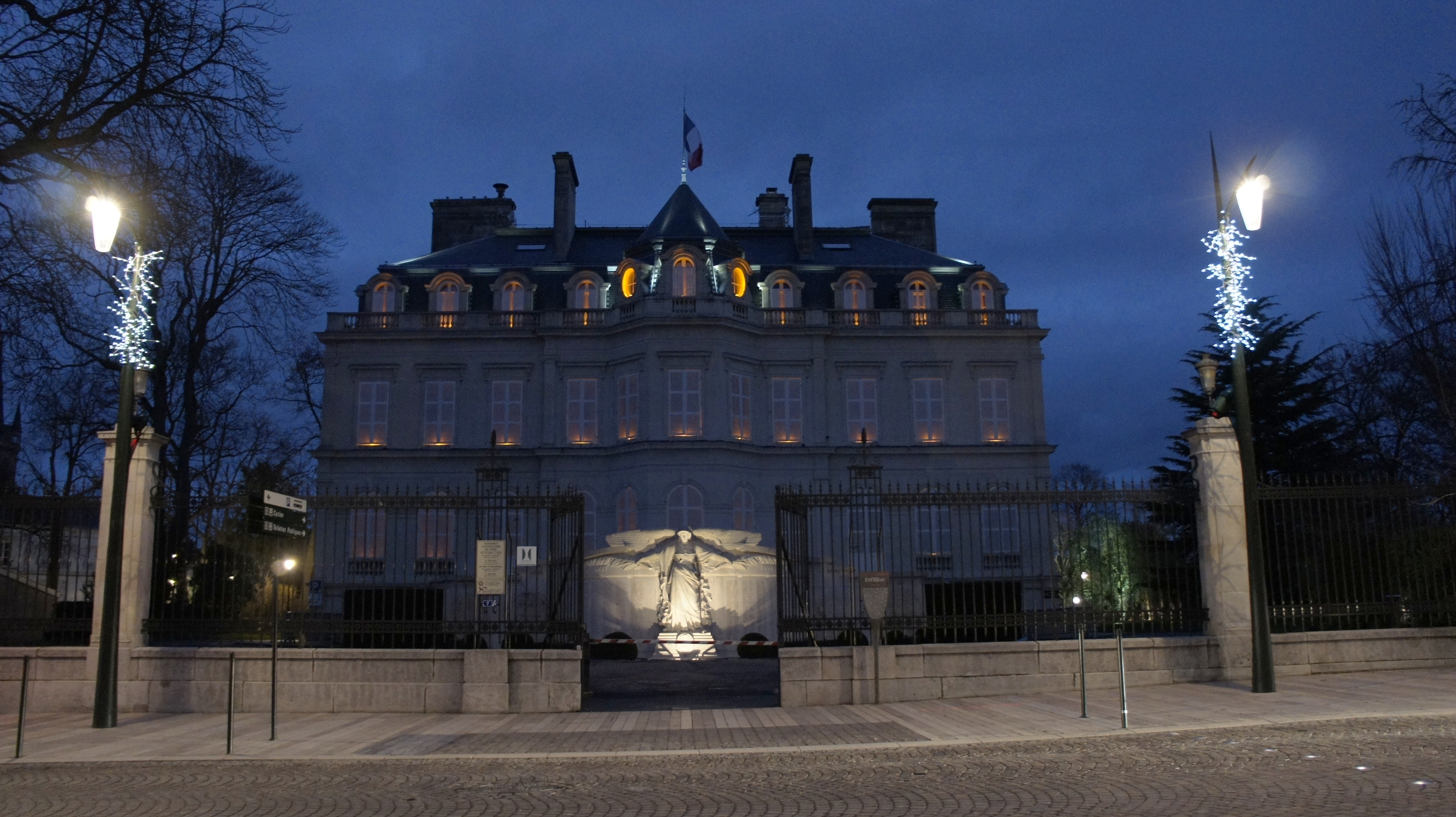 La Mairie_vue depuis_l'avenue_de_Champagne_pour la Nuits en Champagne.